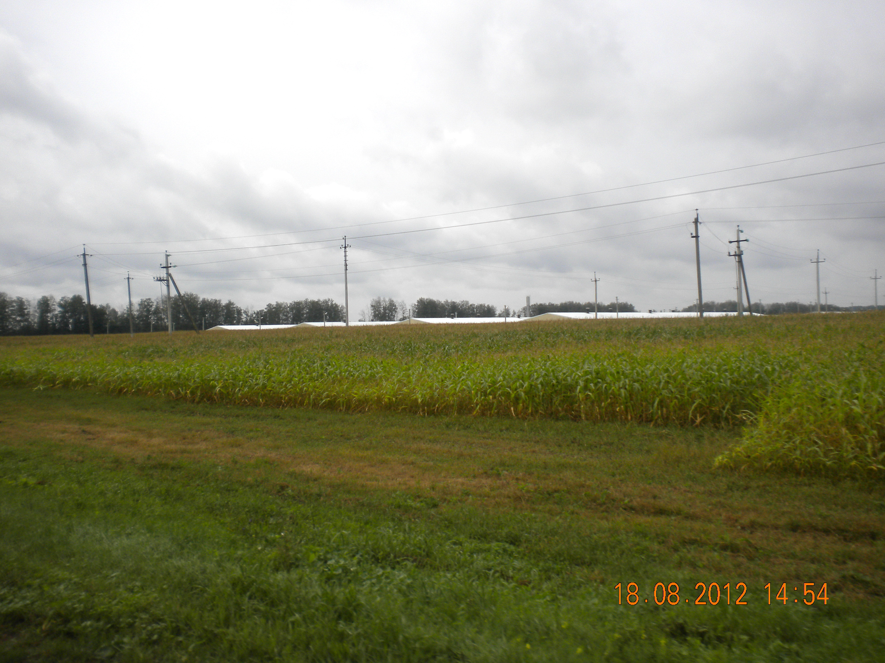 Площадка «Вертуновская» ОАО ПТФ «Васильевская». 2012 год.